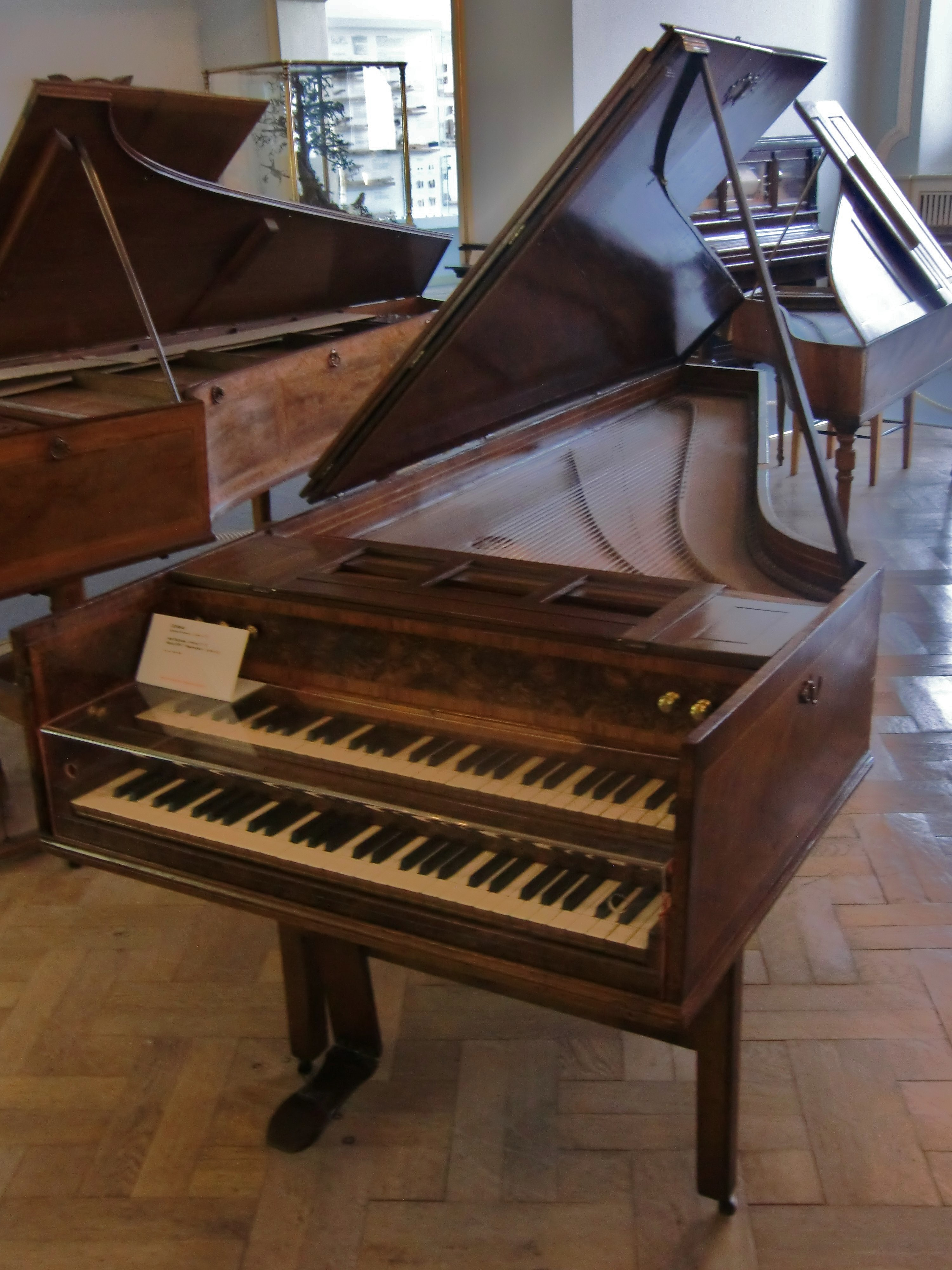 Clavecin de Jacob Kirckman (Londres, 1771) - Munich, Deutsches Museum